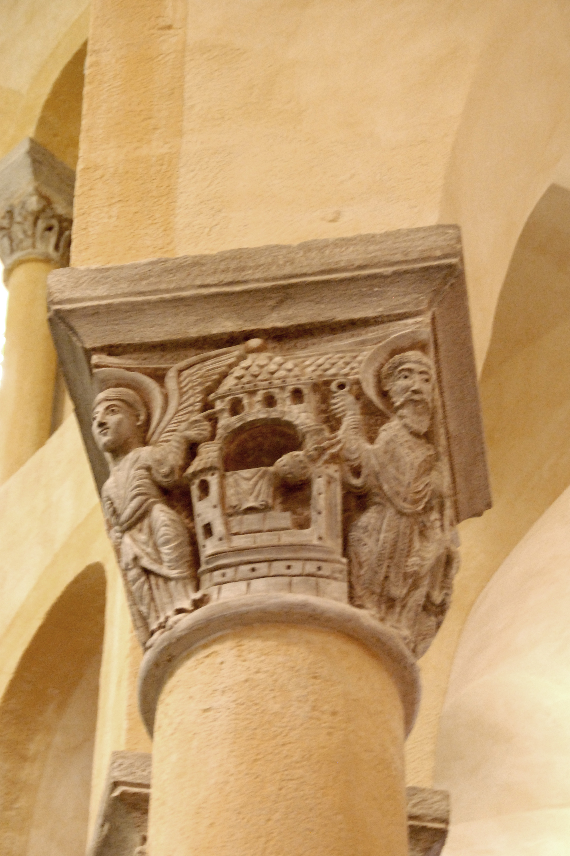 Notre-Dame du Port, Chorkapitell B, Seite 7